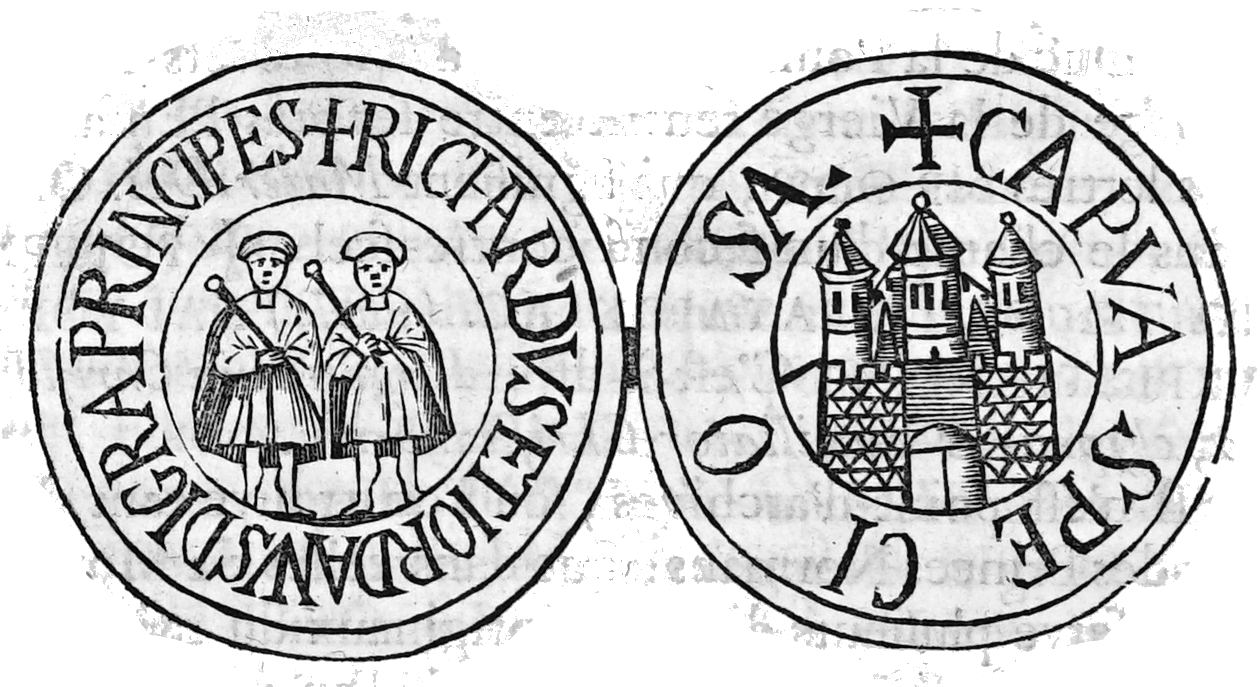 extrait du "nouveau traité de diplomatique" tome 4. Une porte de la ville de Padoue et le ROger et son fils Jourdain.